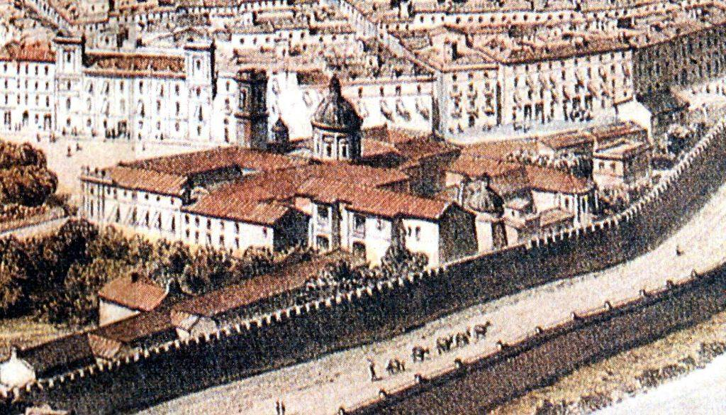 Convent de Sant Domingo o Doménec de València, dibuixat per Alfred Guesdon (1808-1876) en la seua vista general de la ciutat.